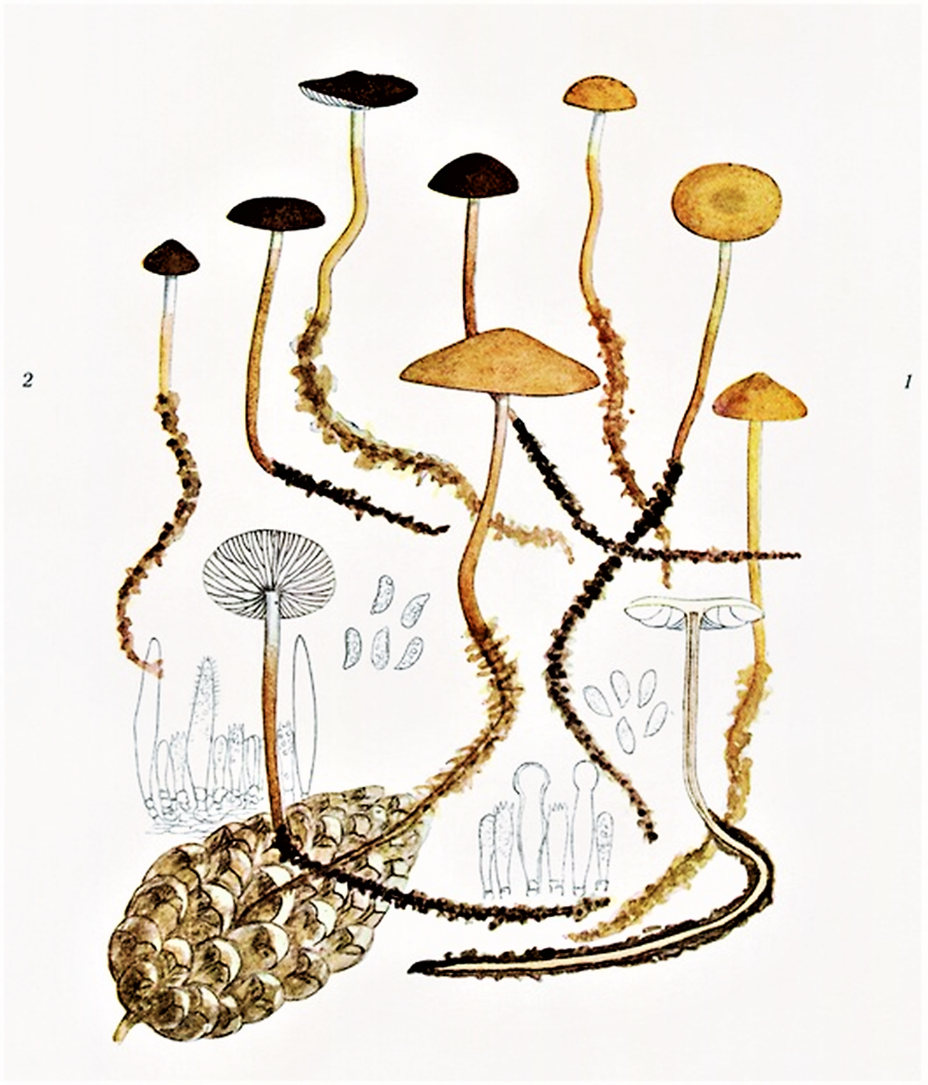 Giacomo Bresadola: 1. Collybia esculenta (Wulfen, 1781) P.Kumm. (1871) heute Strobilurus esculentus (Wulfen) Singer (1962); 2. Collybia conigena Pers., 1801) P.Kumm. (1871), heute Baeospora myosura (Fr., 1818) Singer (1938)